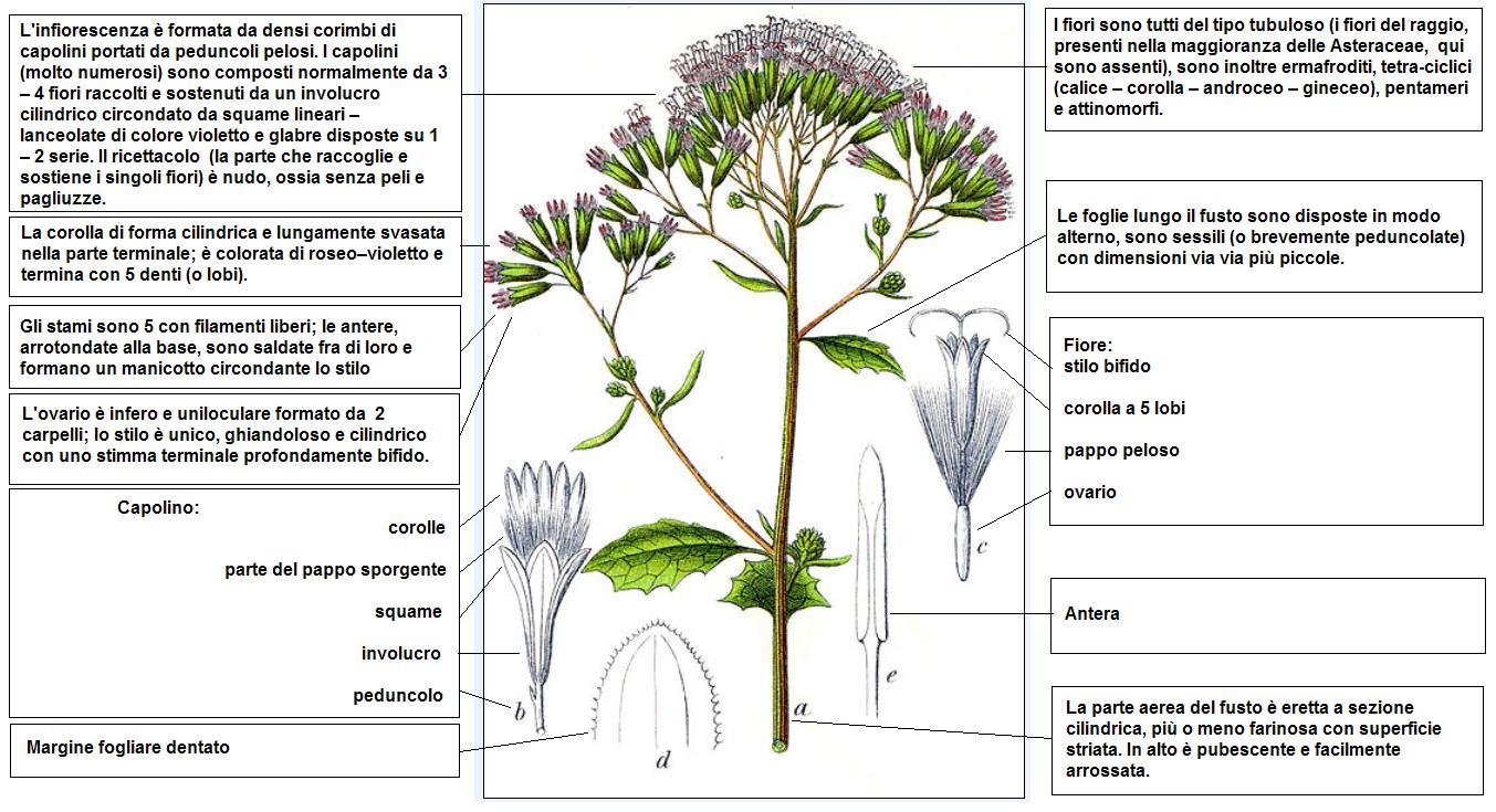 Adenostyles alliariae DESC Sturm